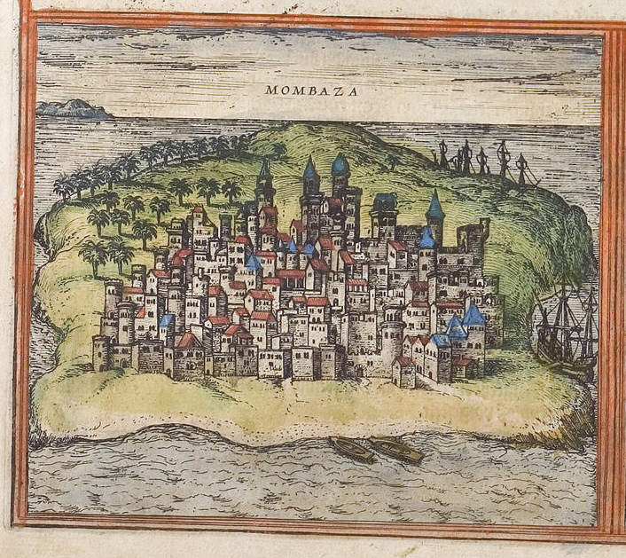 Mombaza (Mombasa)